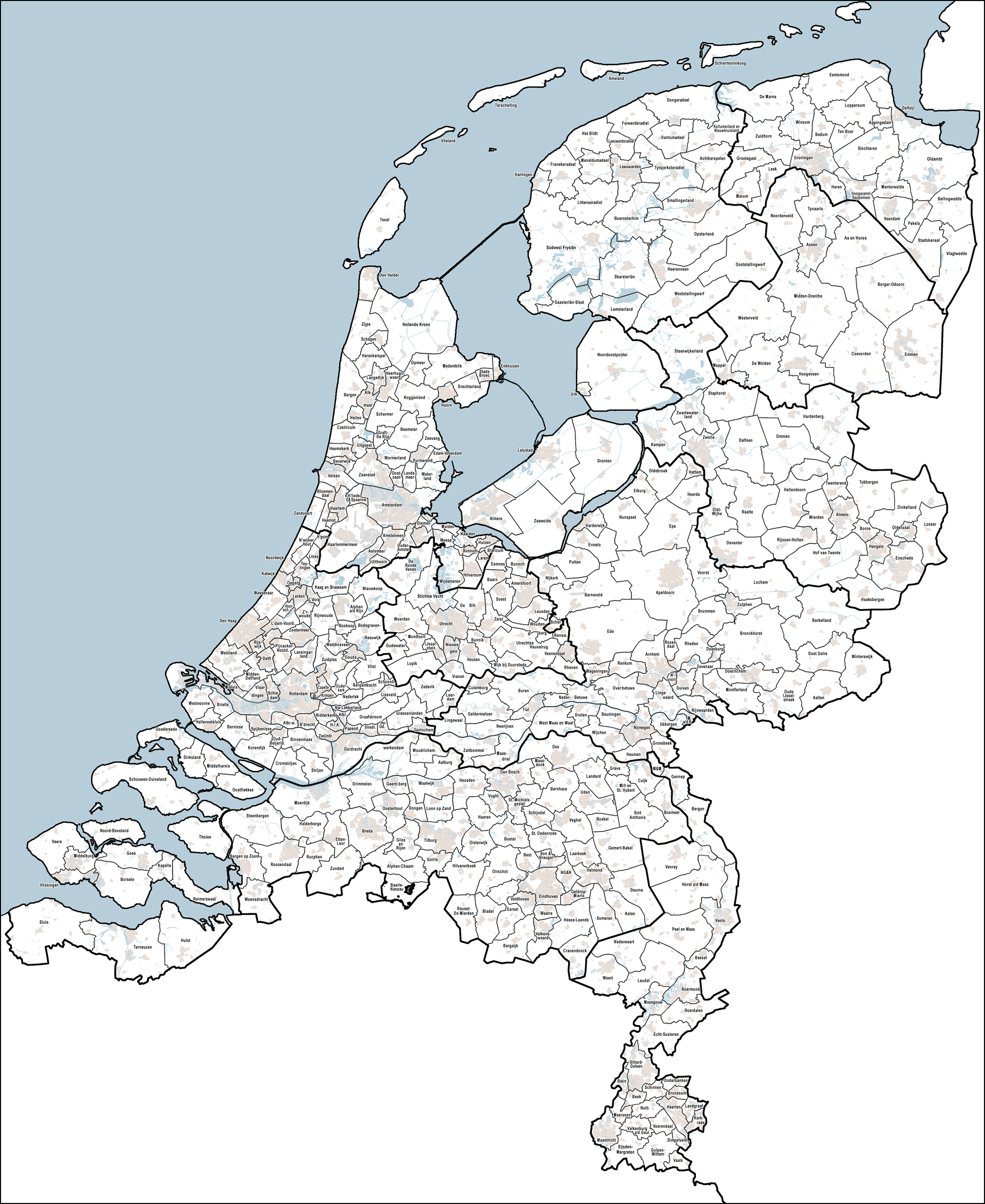 Nederlandse gemeenten (EN: "municipalities"), met gemeentegrenzen per 1-1-2012